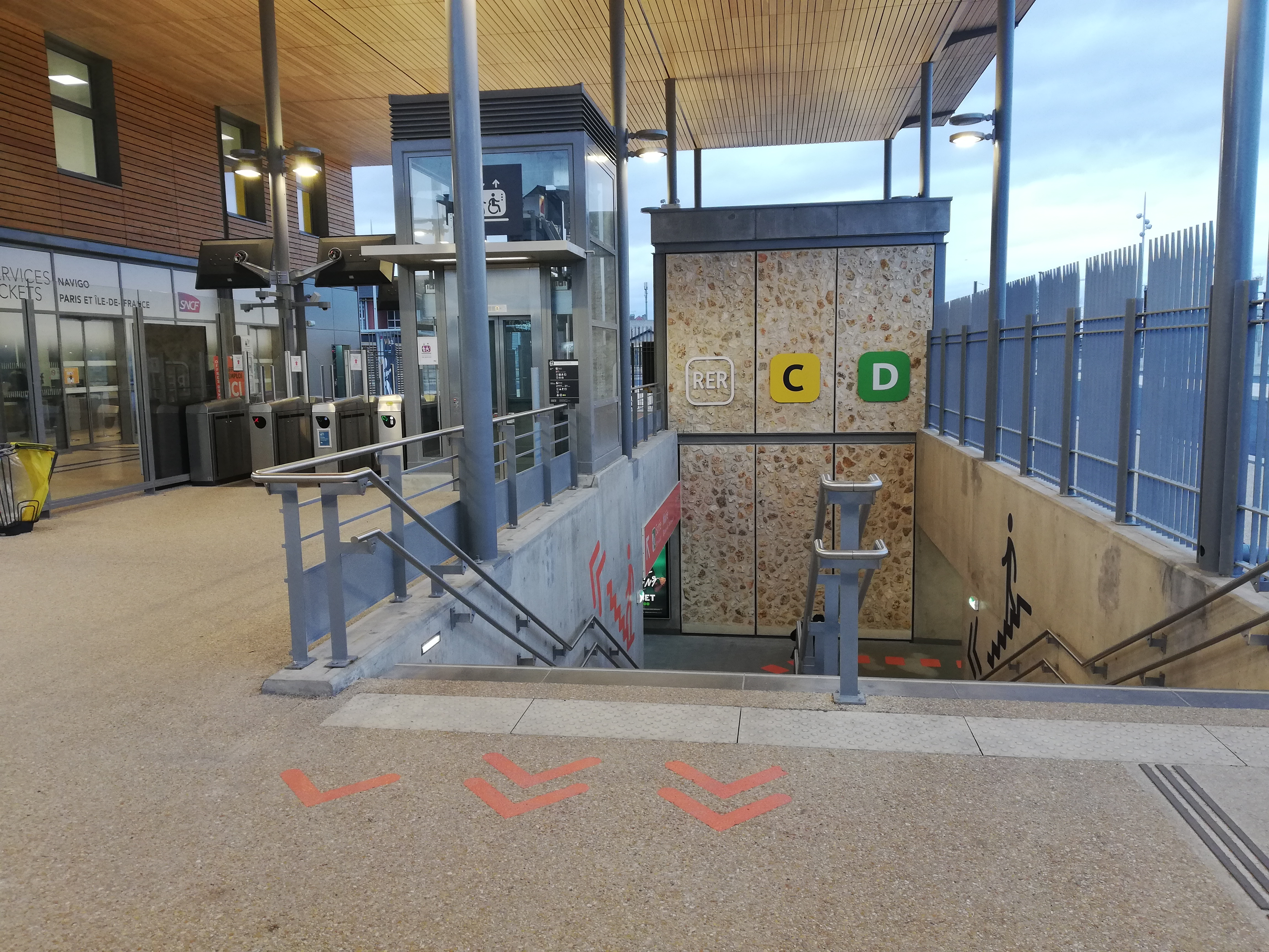 Accès aux quais de la gare de Juvisy en 2020.